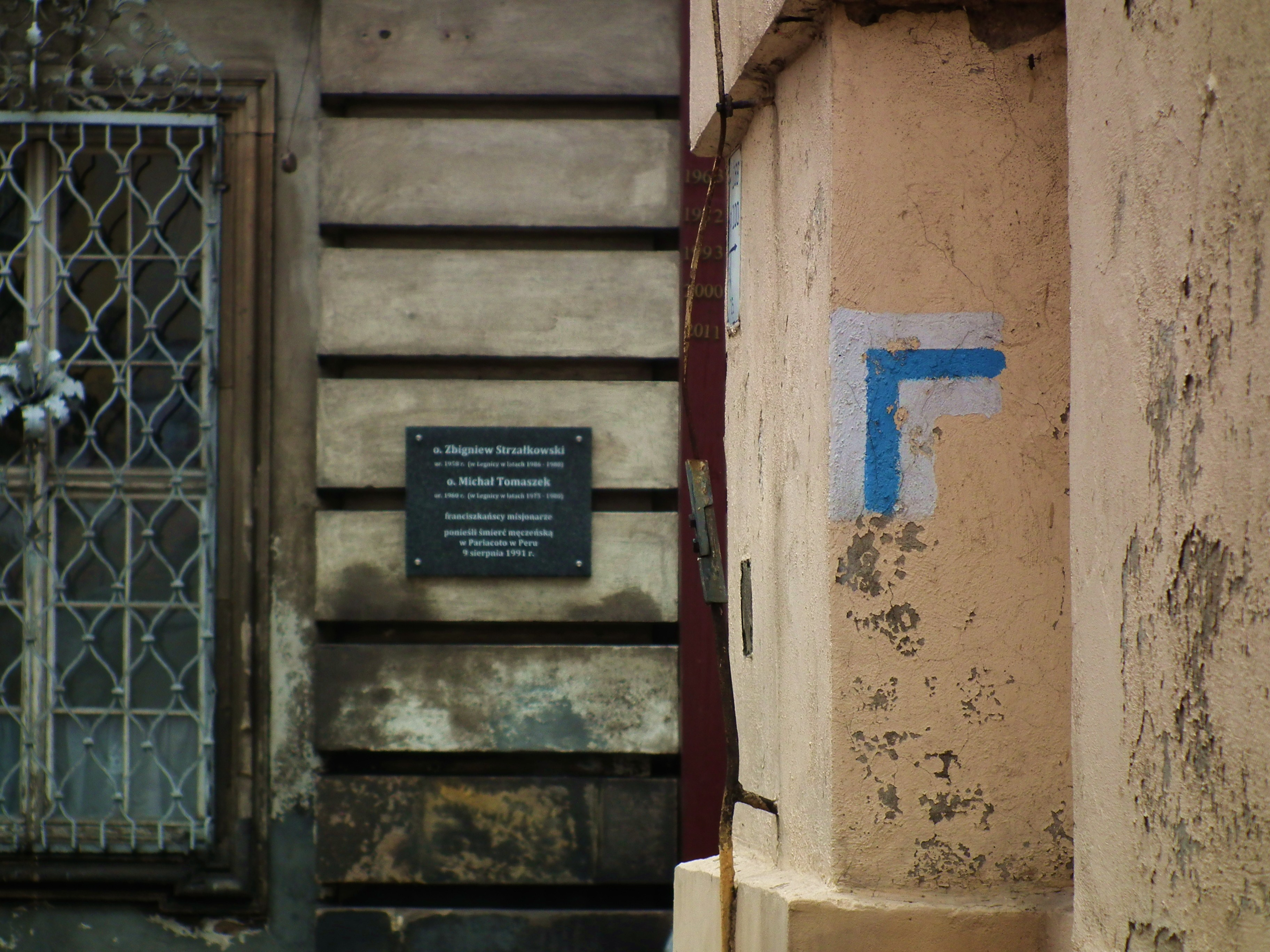 Legnica - impresja miejska.